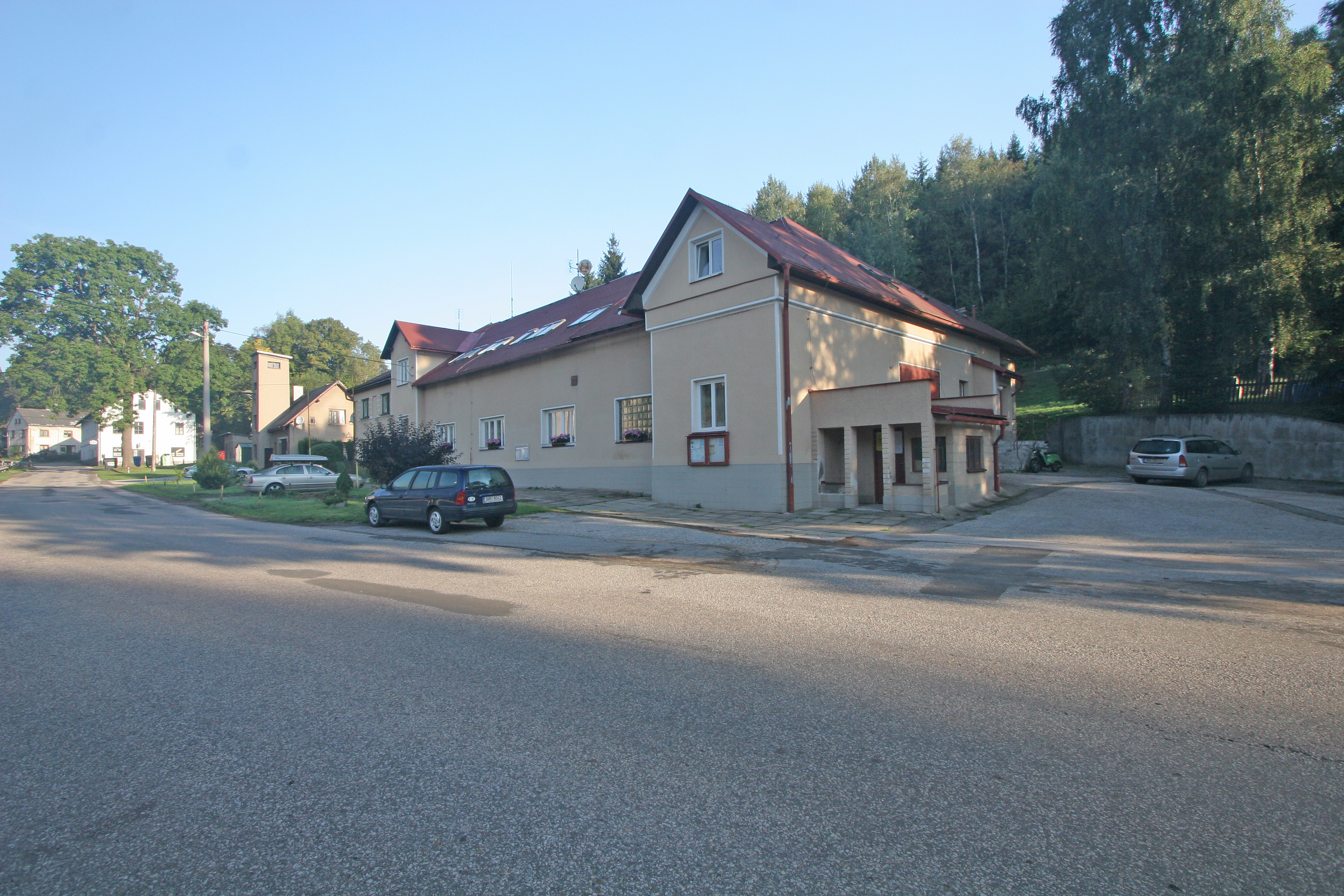 lampertice obecní úřad ?